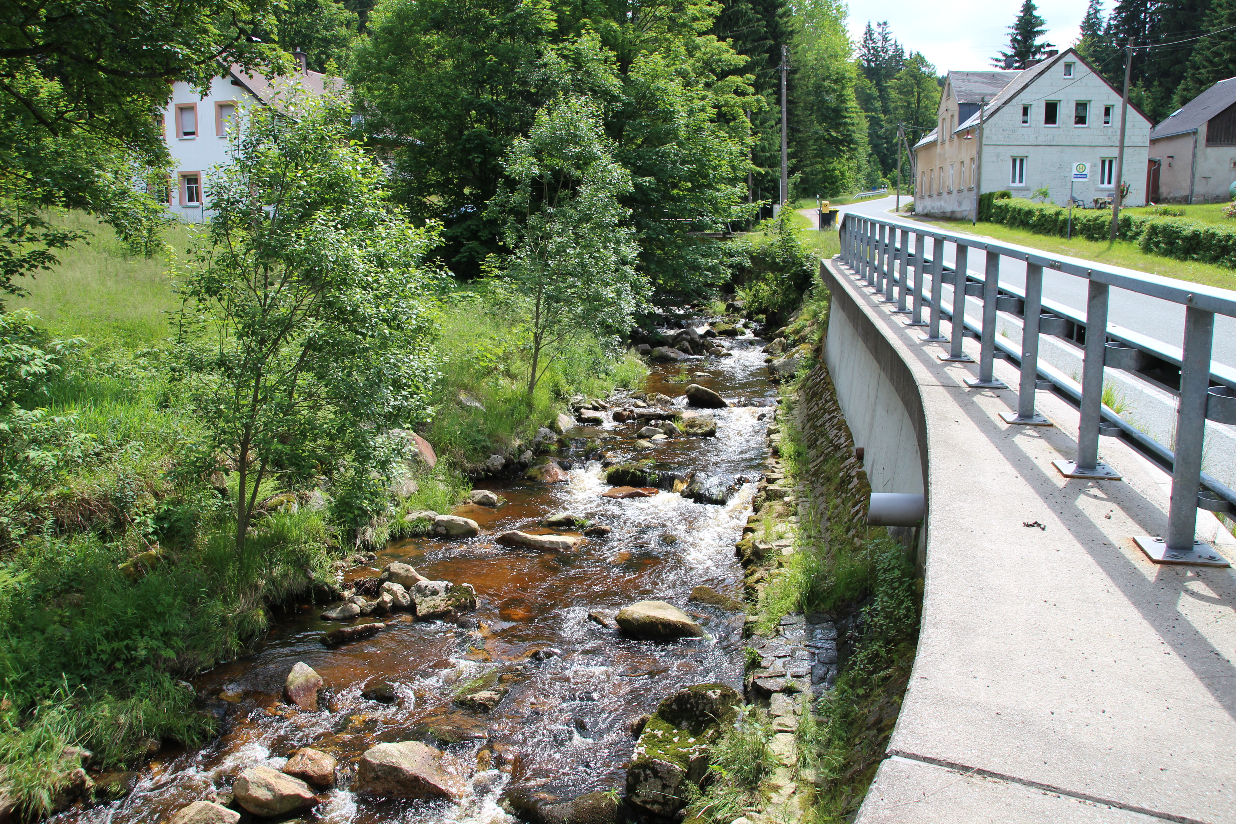 Blechhammer, Ortsteil von Eibenstock an der Wilzsch, hatte früher eine Gastwirtschaft, heute ein Wohnhaus. Sie lag direkt an der Staatsstraße 276 in Richtung Carlsfeld rechts am Ortsausgang ziemlich an der Brücke über die Wilzsch. Früher war der Inhaber Ernst Tauscher. Aus alten Zeiten hängt noch ein emailliertes Schild am Haus: „Öffentlicher Fernsprecher“. Es ist das Haus rechts. Links fließt die Wilzsch.